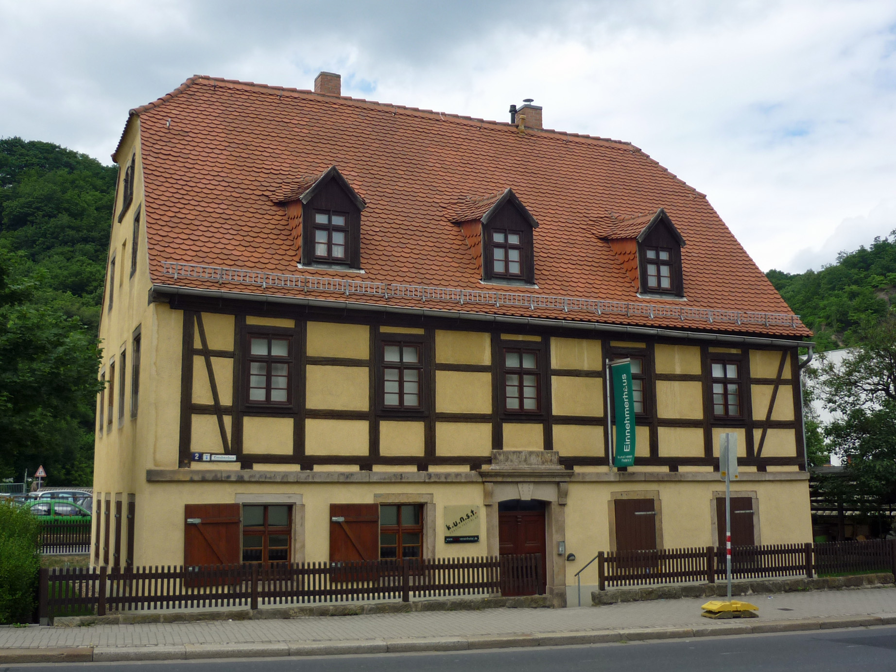 Dresdner Str. 2 in Freital-Potschappel ("Einnehmerhaus")